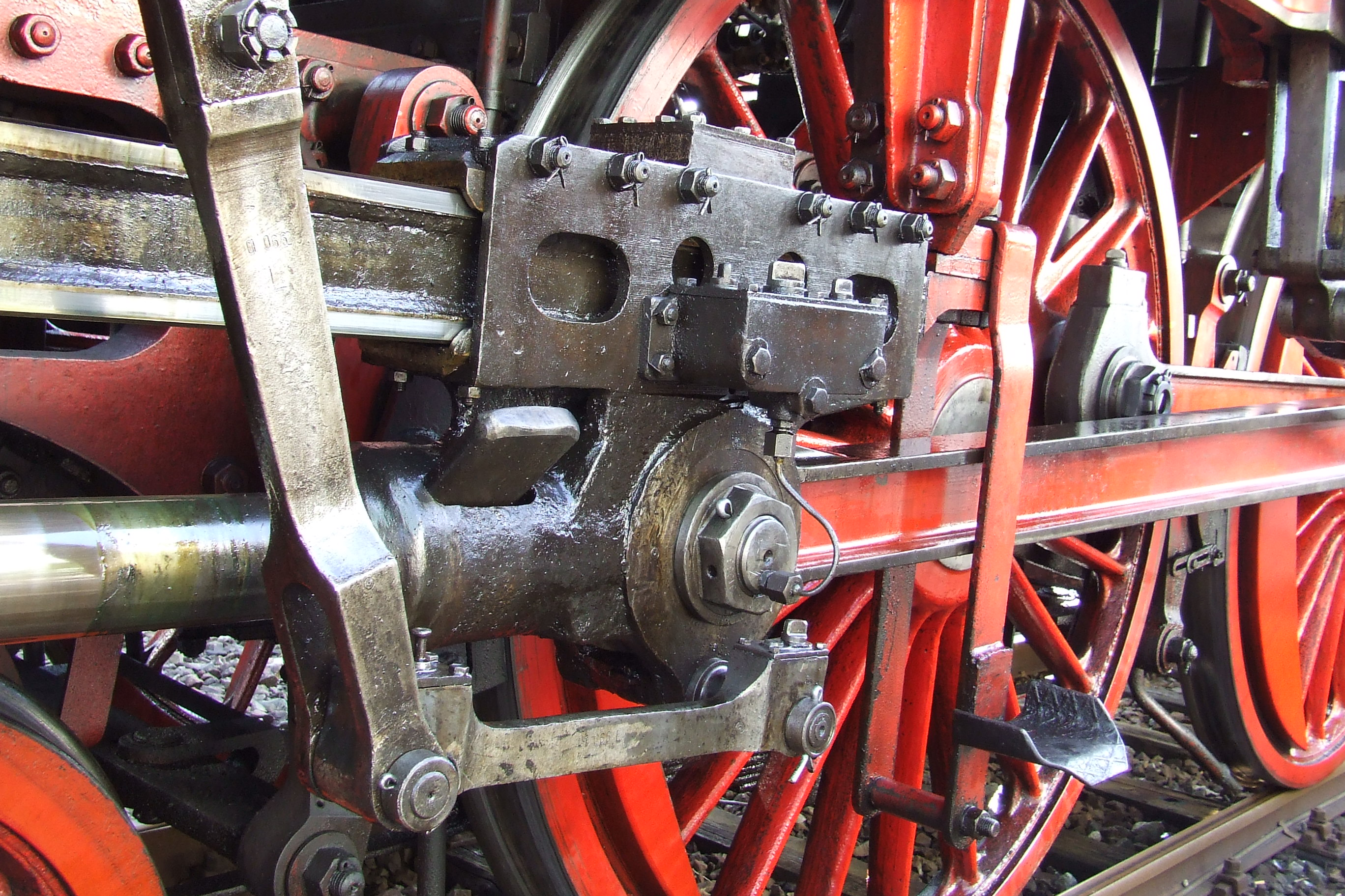 Dampflok 01 066 Zylinderblock Kreuzkopf